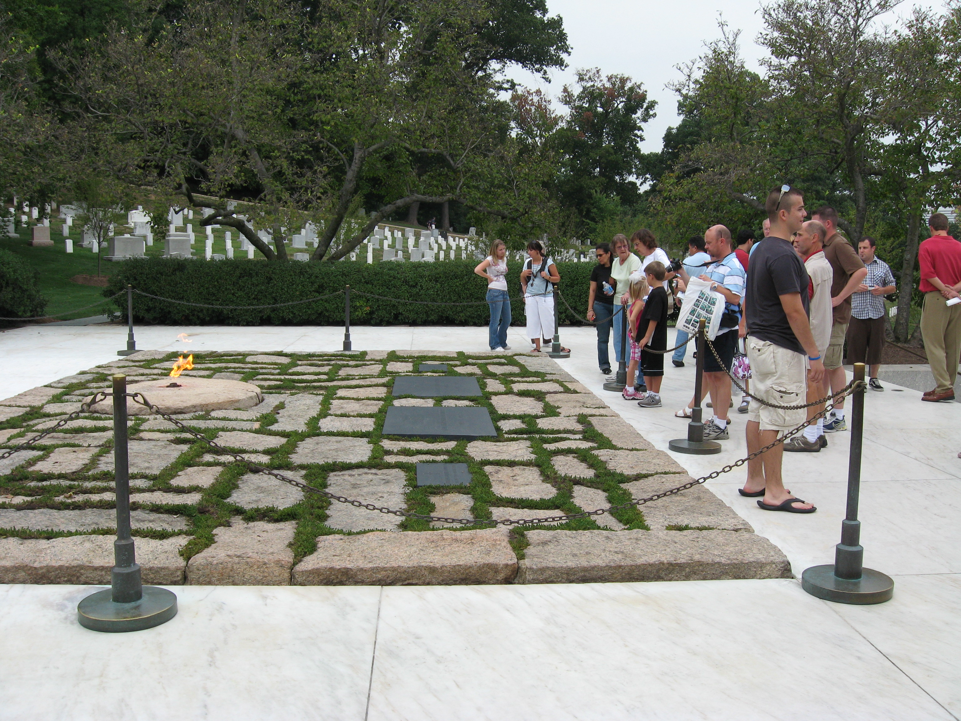 JFK Eternal Flame